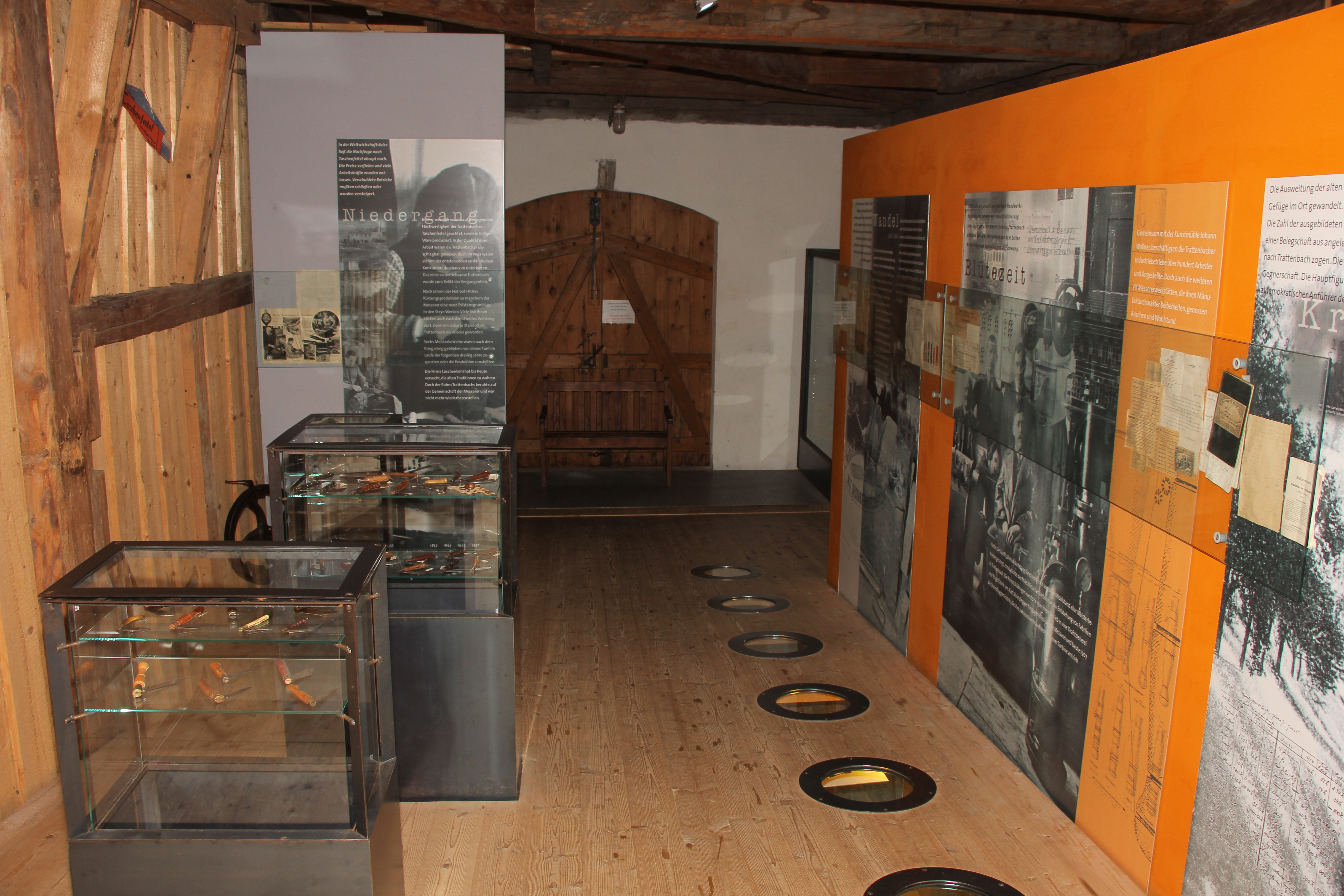 Besuch des Trattenbachtales im Rahmen der KulTour von WMAT